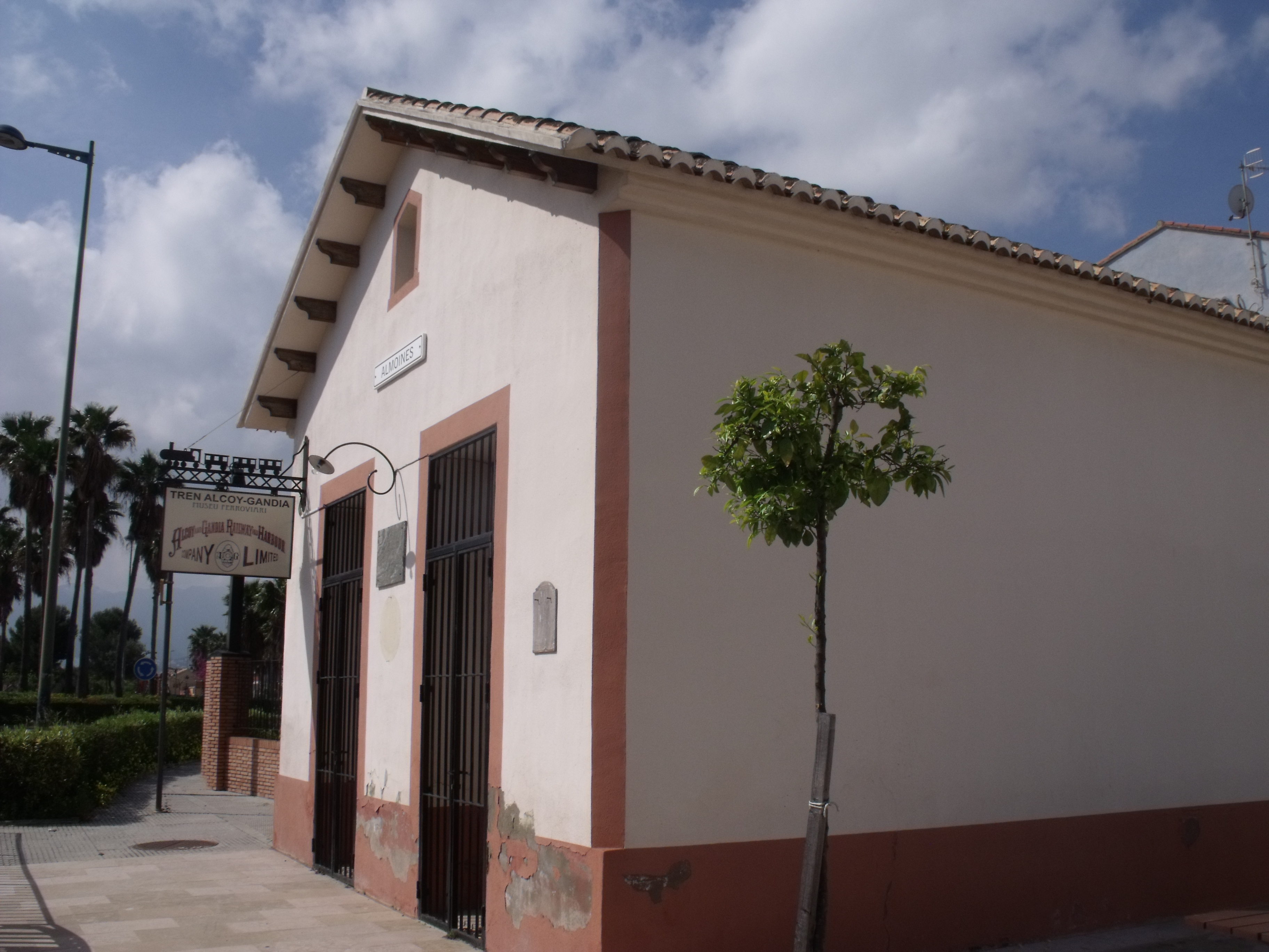 Imágenes del edificio y de la máquina de la asociación del antiguo tren Gandía-Alcoy